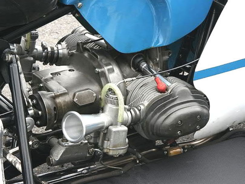 Motor der BMW RS 54 in einem Replikat des Gespanns von Deubel/Hörner